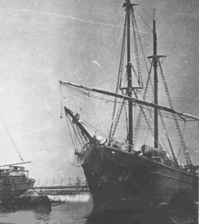 אוניית המעפילים כתריאל יפה